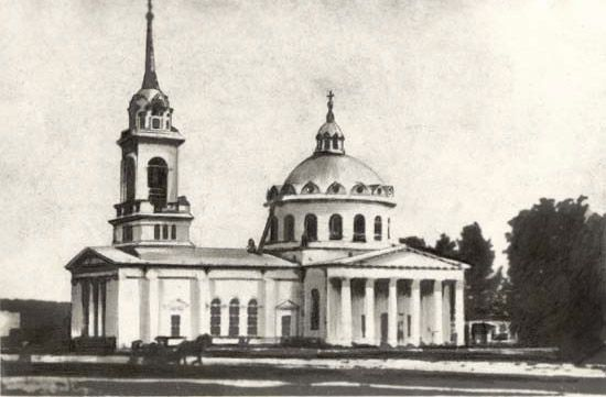 Преображенский храм в Дятькове (ныне не существует)